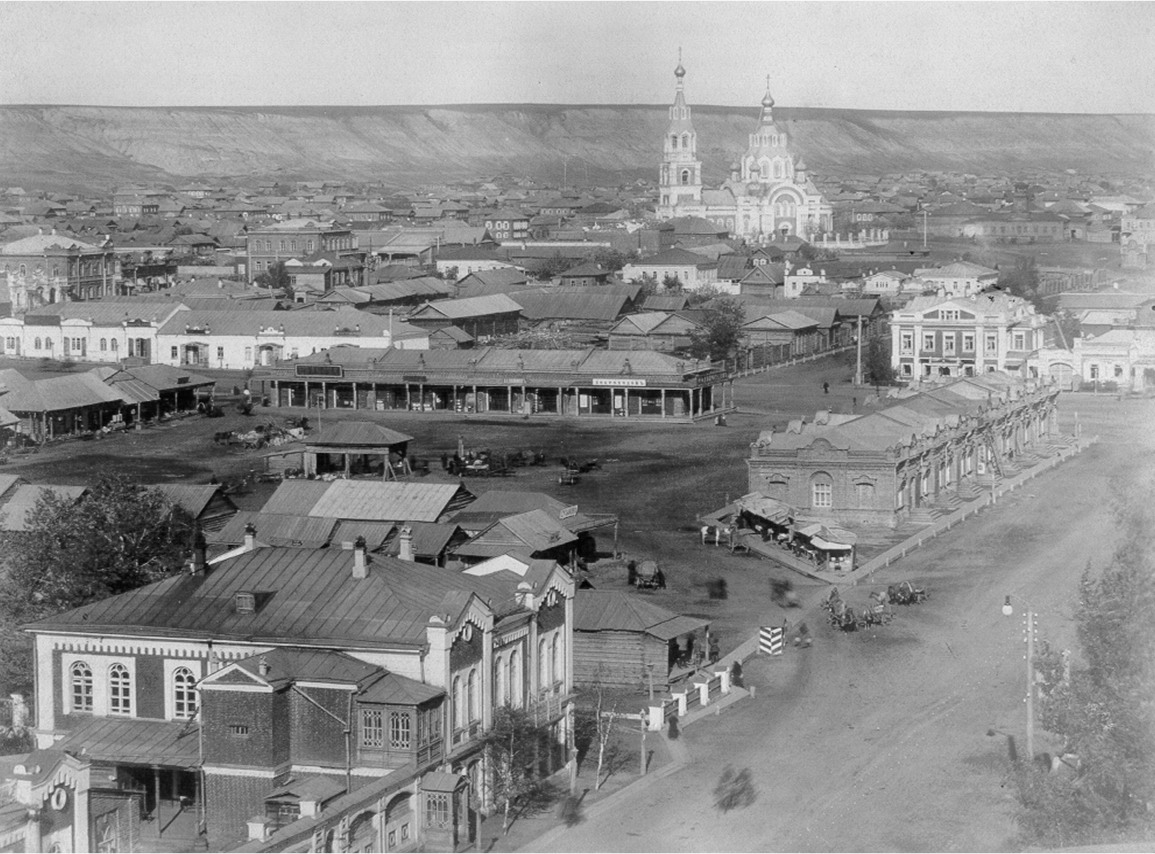 Базарная площадь. Вид с Успенского собора на Троицкую церковь. Ныне на месте Базарной площади расположен стадион «Авангард» (Советская улица, дом 13). В конце XIX века Казачий собор был закрыт, и в 1898 — 1902 годах на площади была построена каменная Успенская церковь.